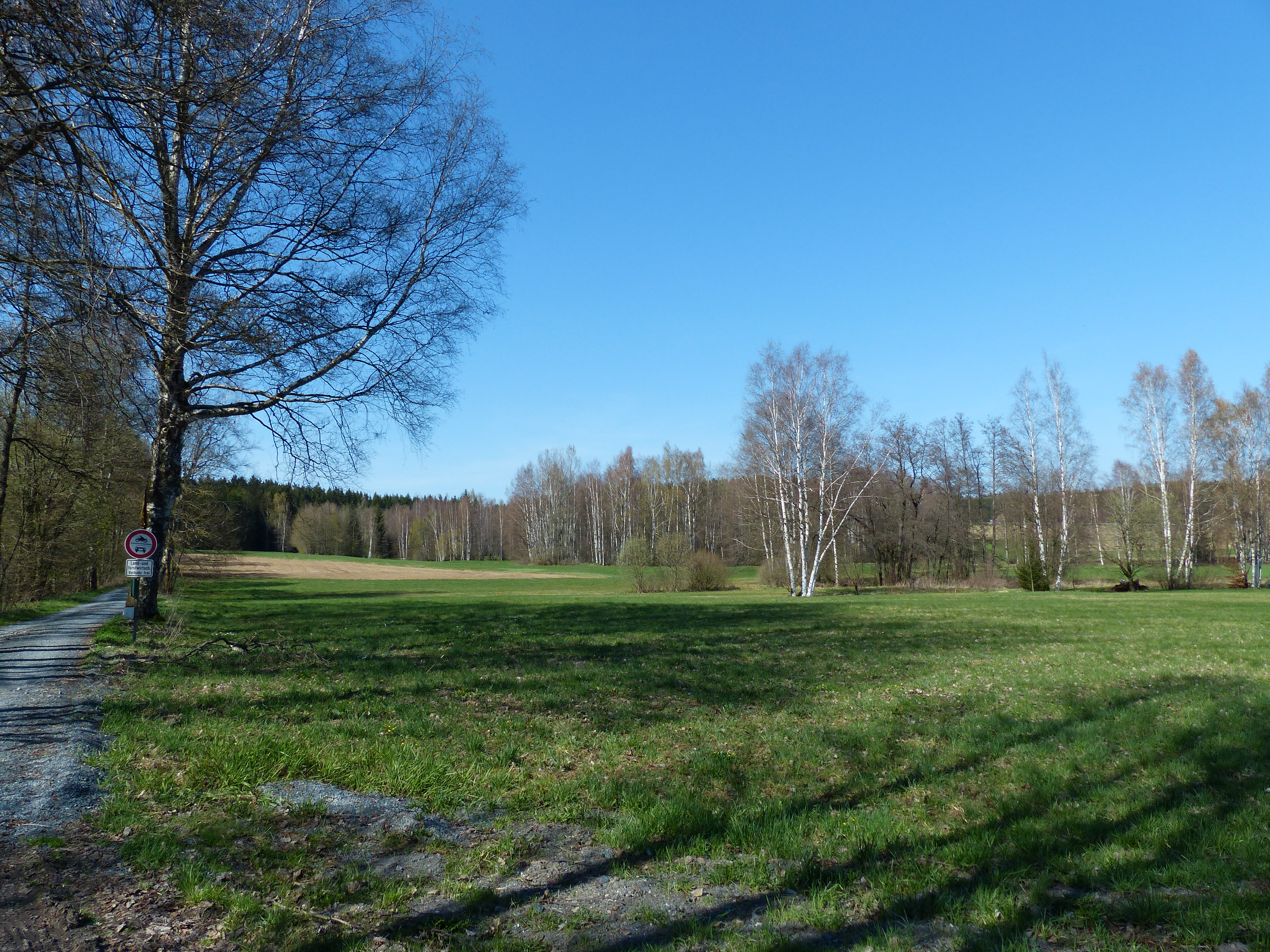 Standort der Wüstung Lauterbach nördlich von Kirchenlamitz